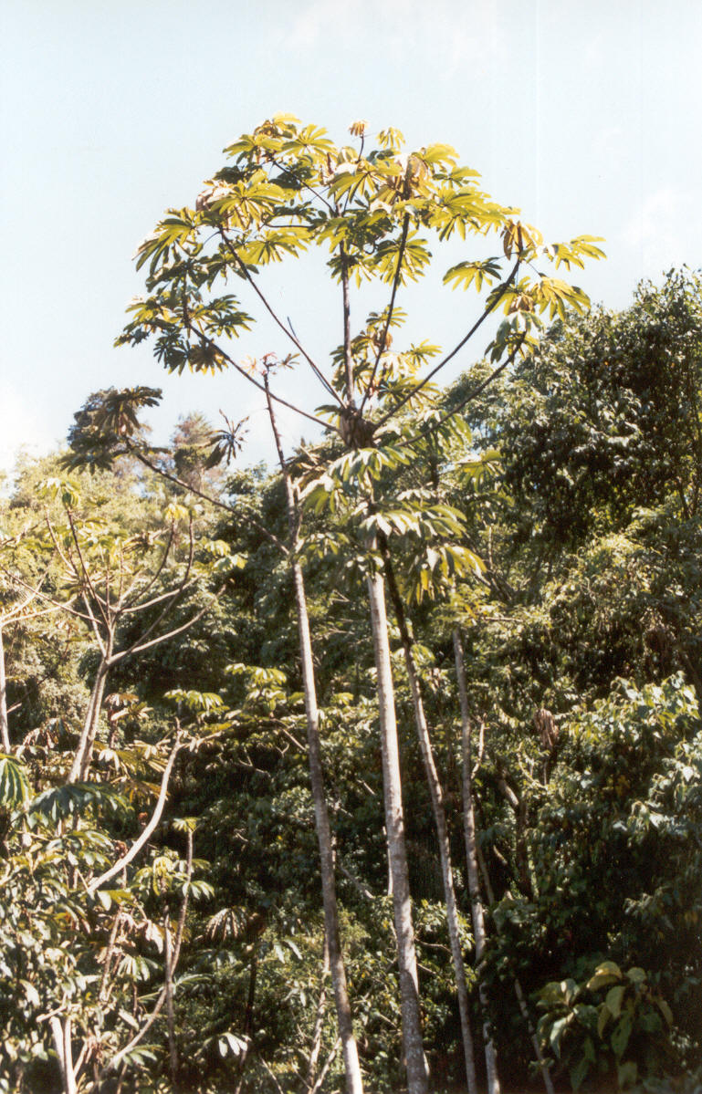 Ejemplar de yagrumo (Cecropia peltata). Lugar: Colonia Tovar, Estado Aragua, Venezuela.